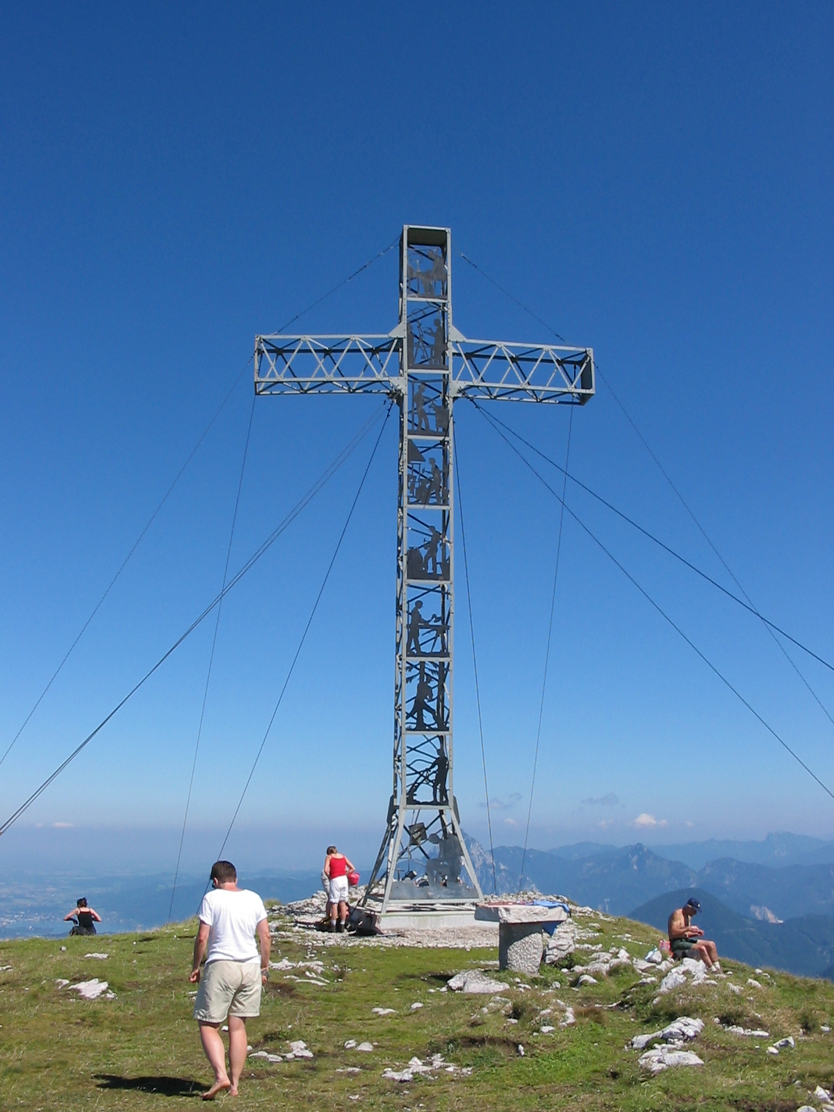 Brunnkogel Kreuz